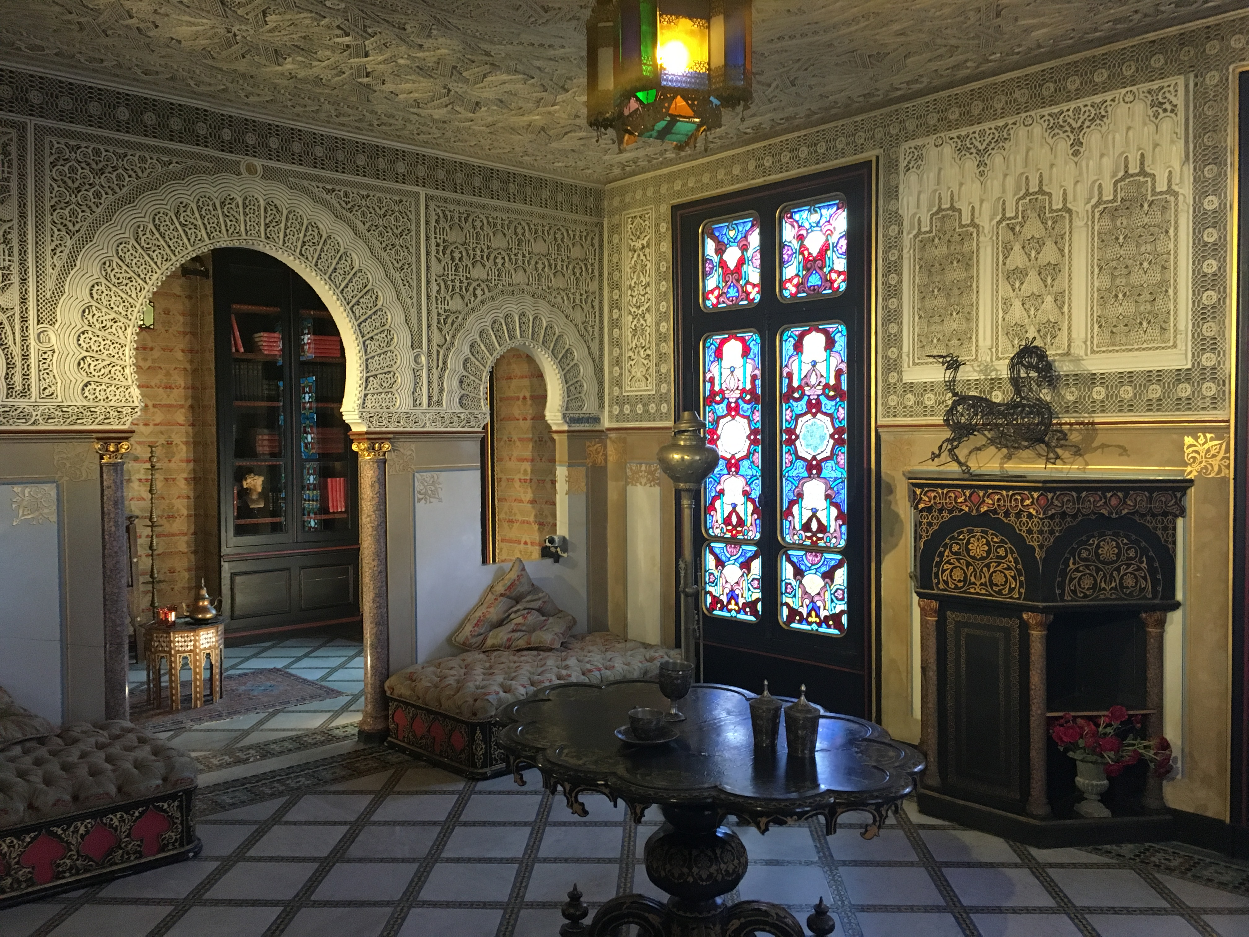 Le salon mauresque restauré du château de Monte Cristo à Port Marly